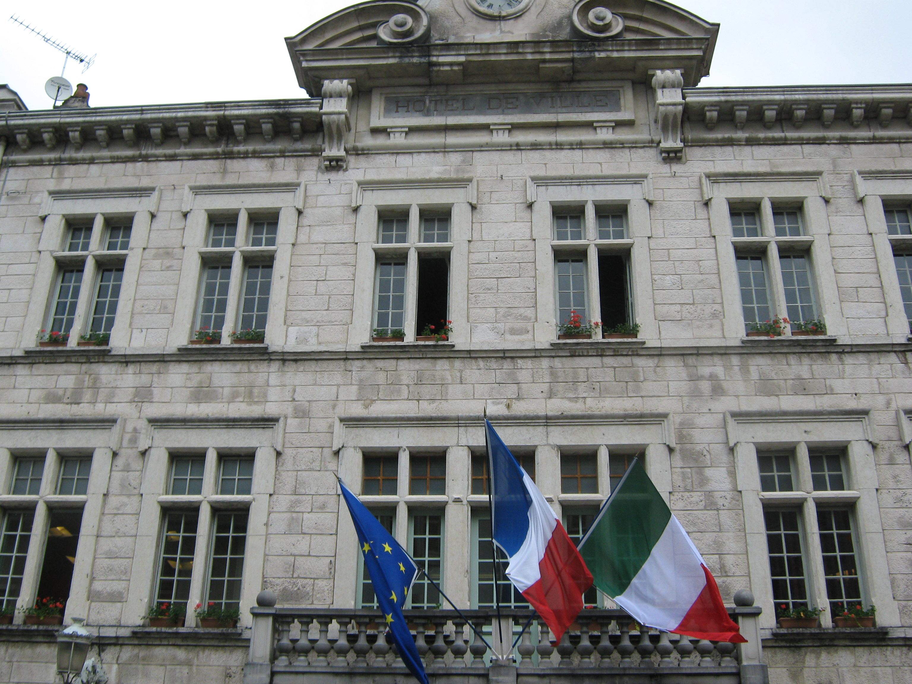 Façade de l'hôtel de ville de Nantua